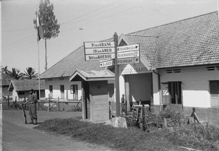 negatief. Kazerne van het korps Prajoda en richtingbord